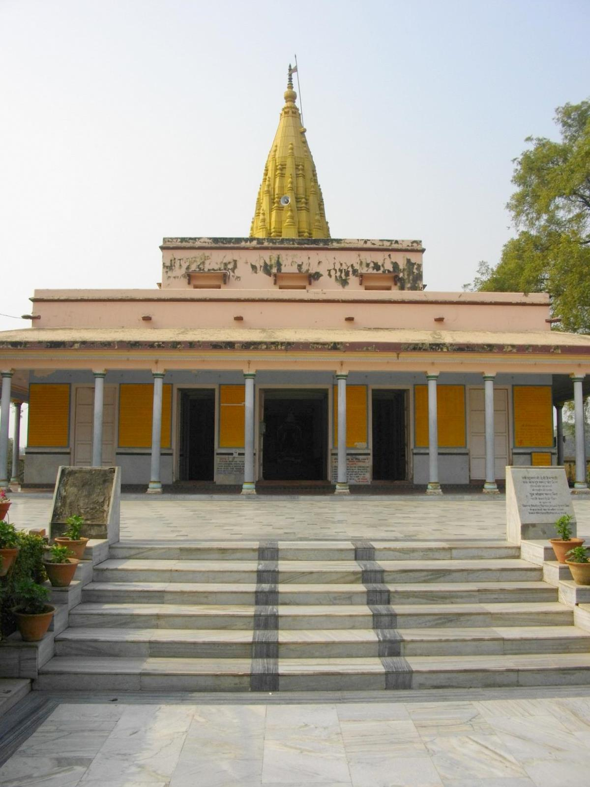 Sridigamber Jain Temple, Singhpuri, Sarnath, Varanasi.